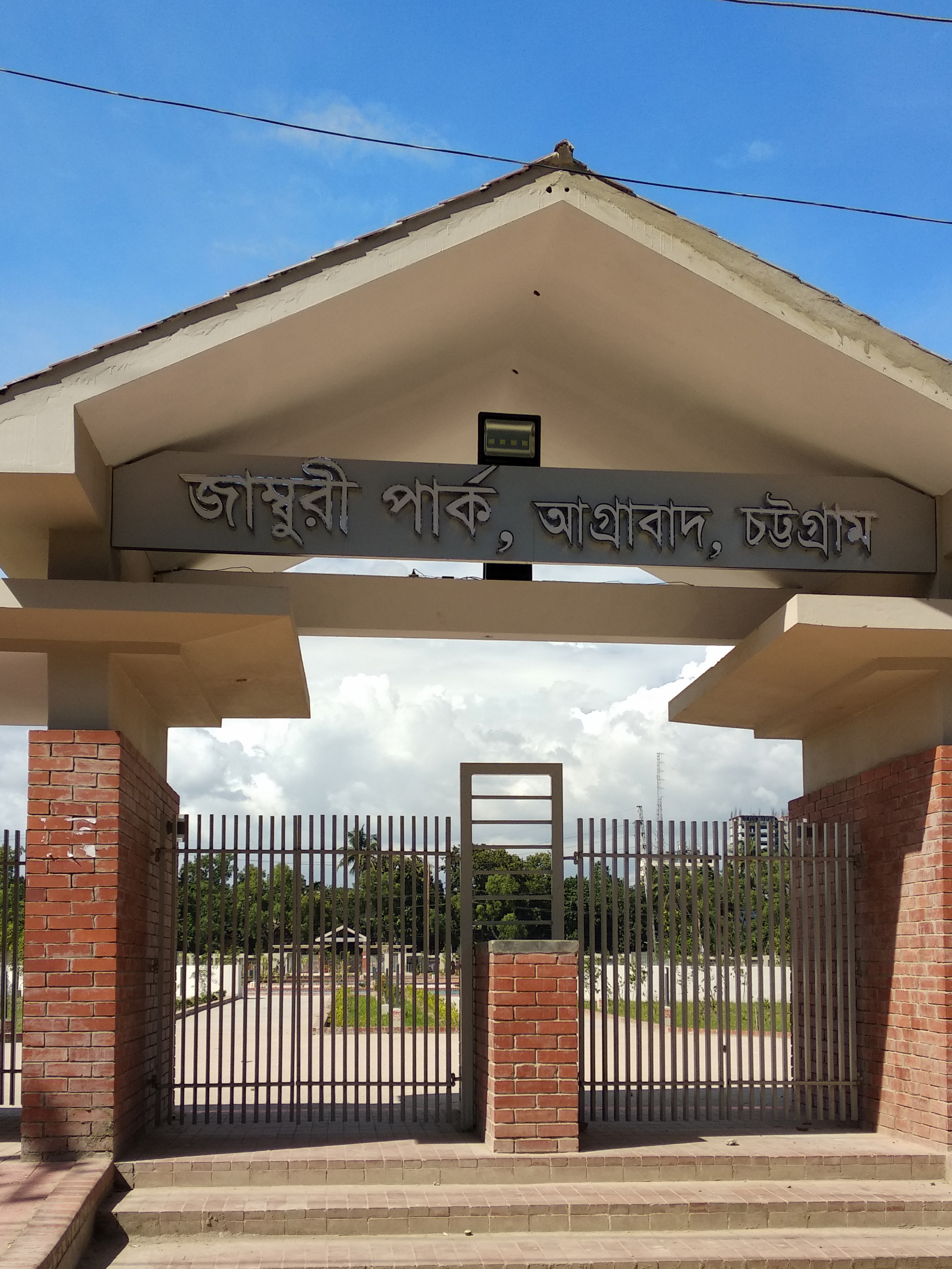 আগ্রাবাদে অবস্থিত জাম্বুরী পার্কের দক্ষিণ গেইট।